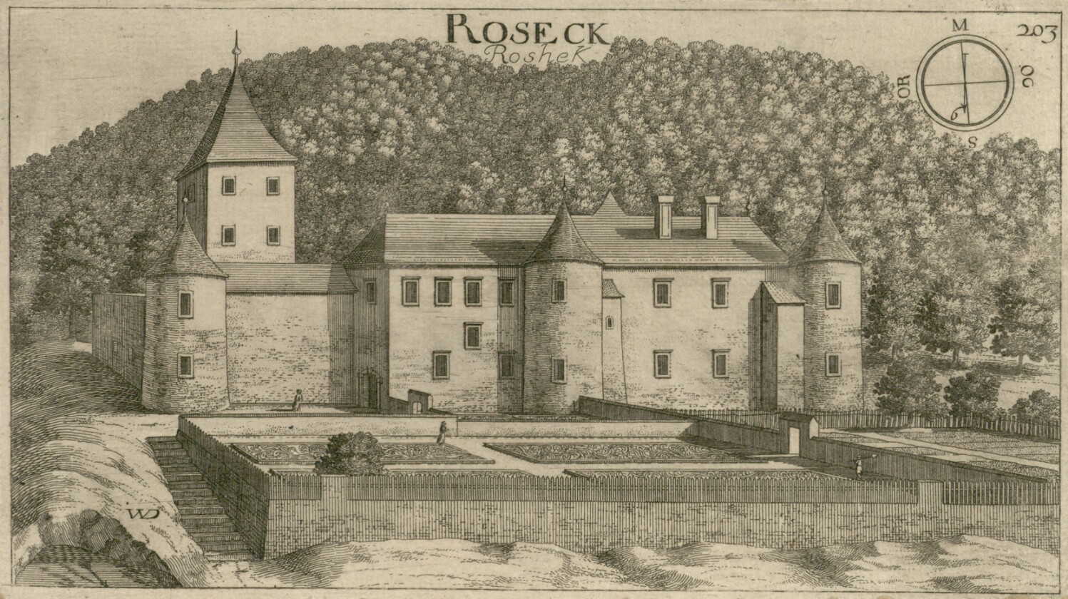 Grad Rožek (Roseckh)